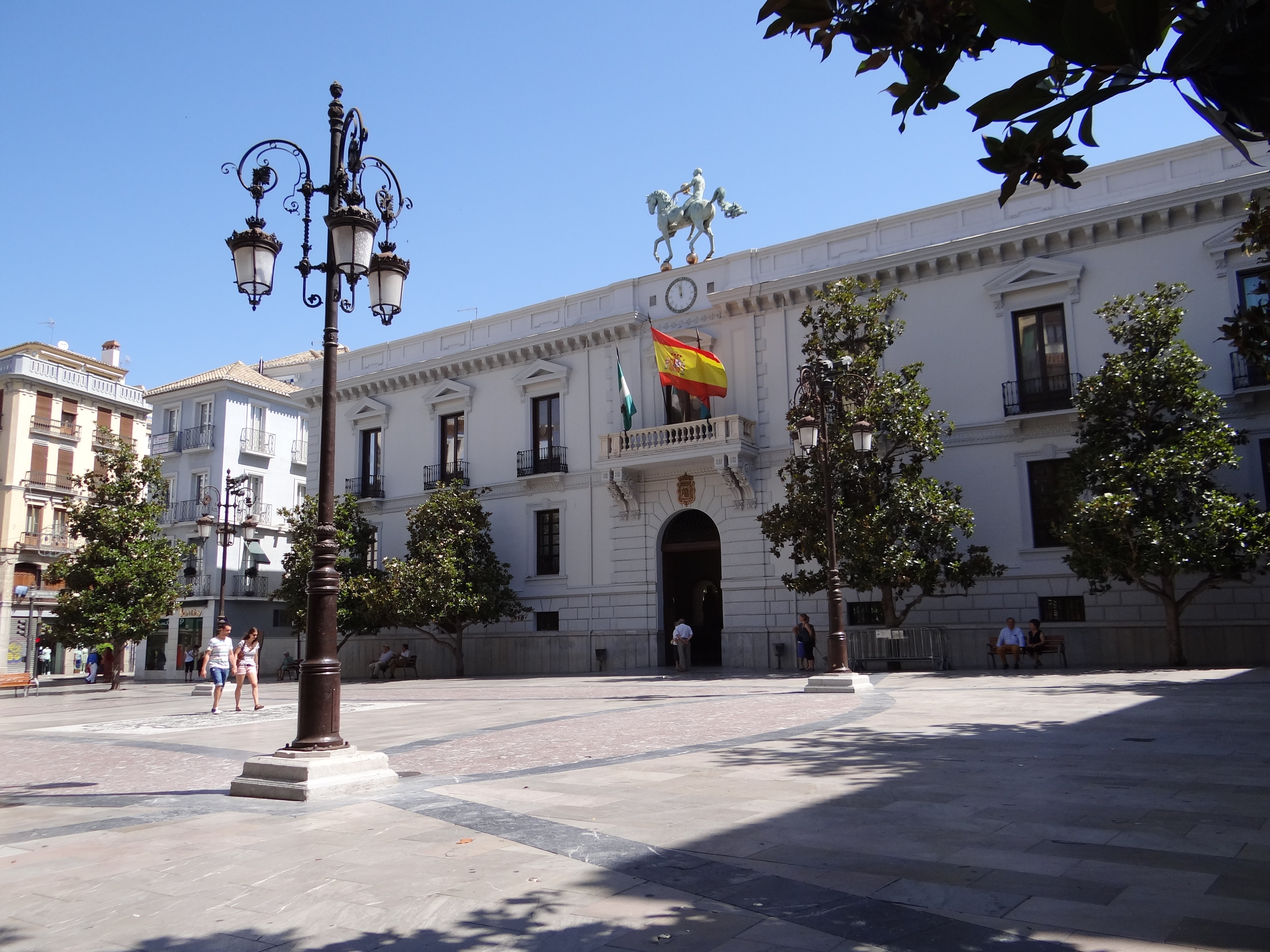 Plaza del Carmen, al fondo el Ayuntamiento de Granada.